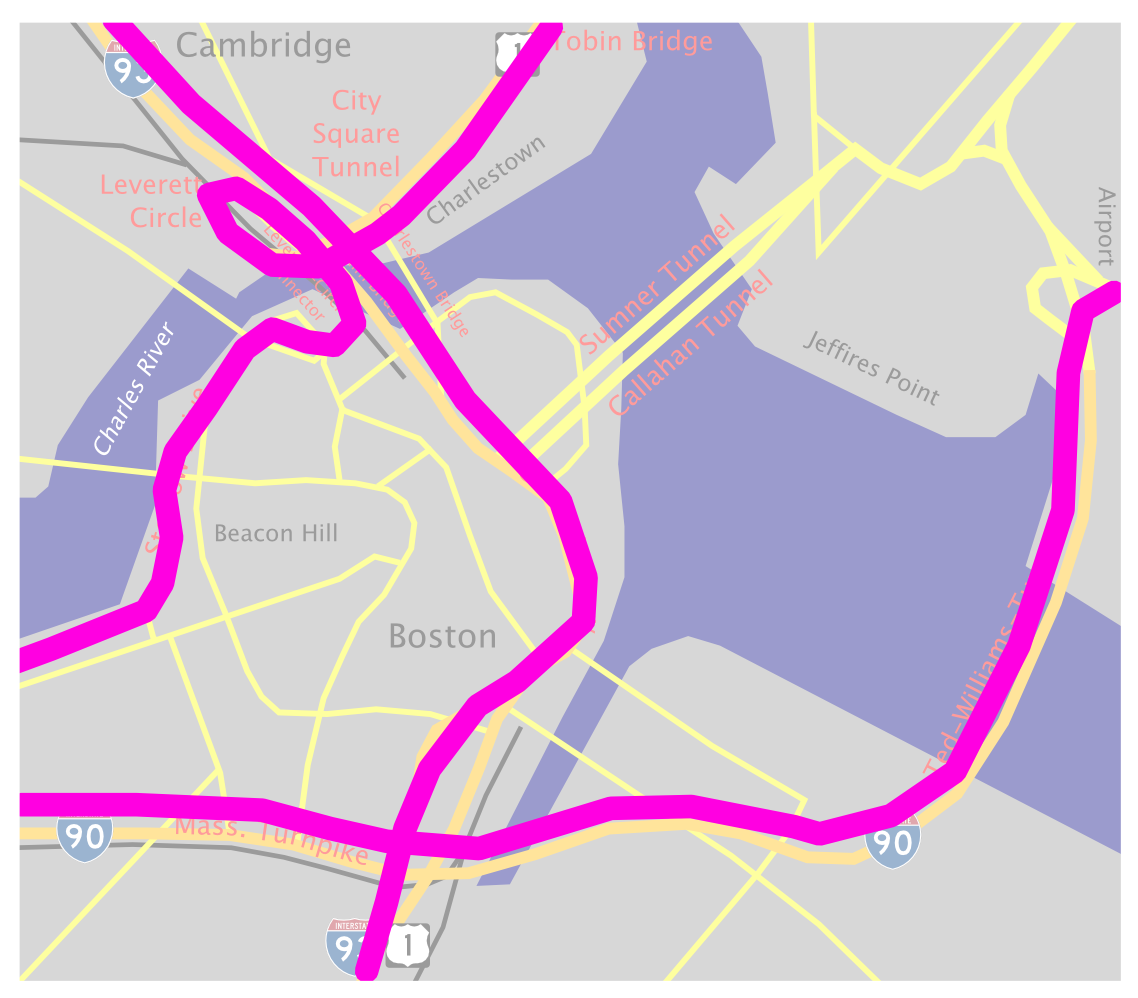 Traffic scheme in Boston after "Big Dig"